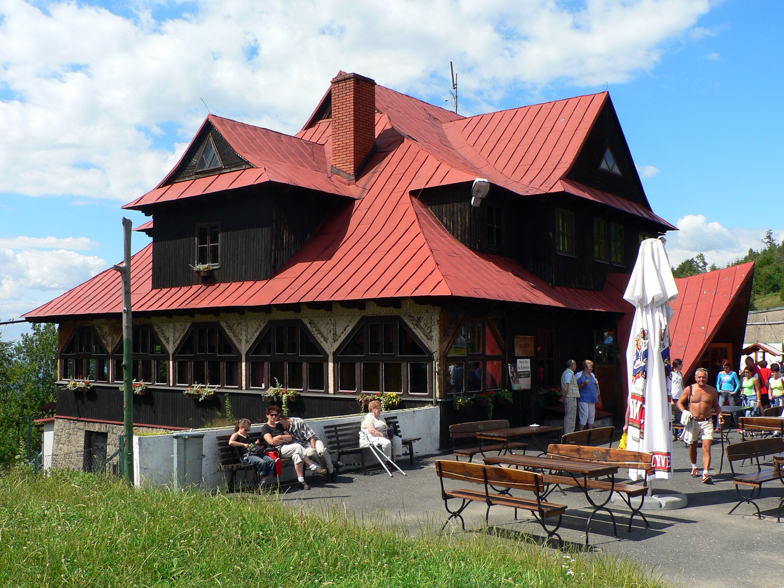 Równica hostel, Beskid Śląski, Poland Author: Wojsyl